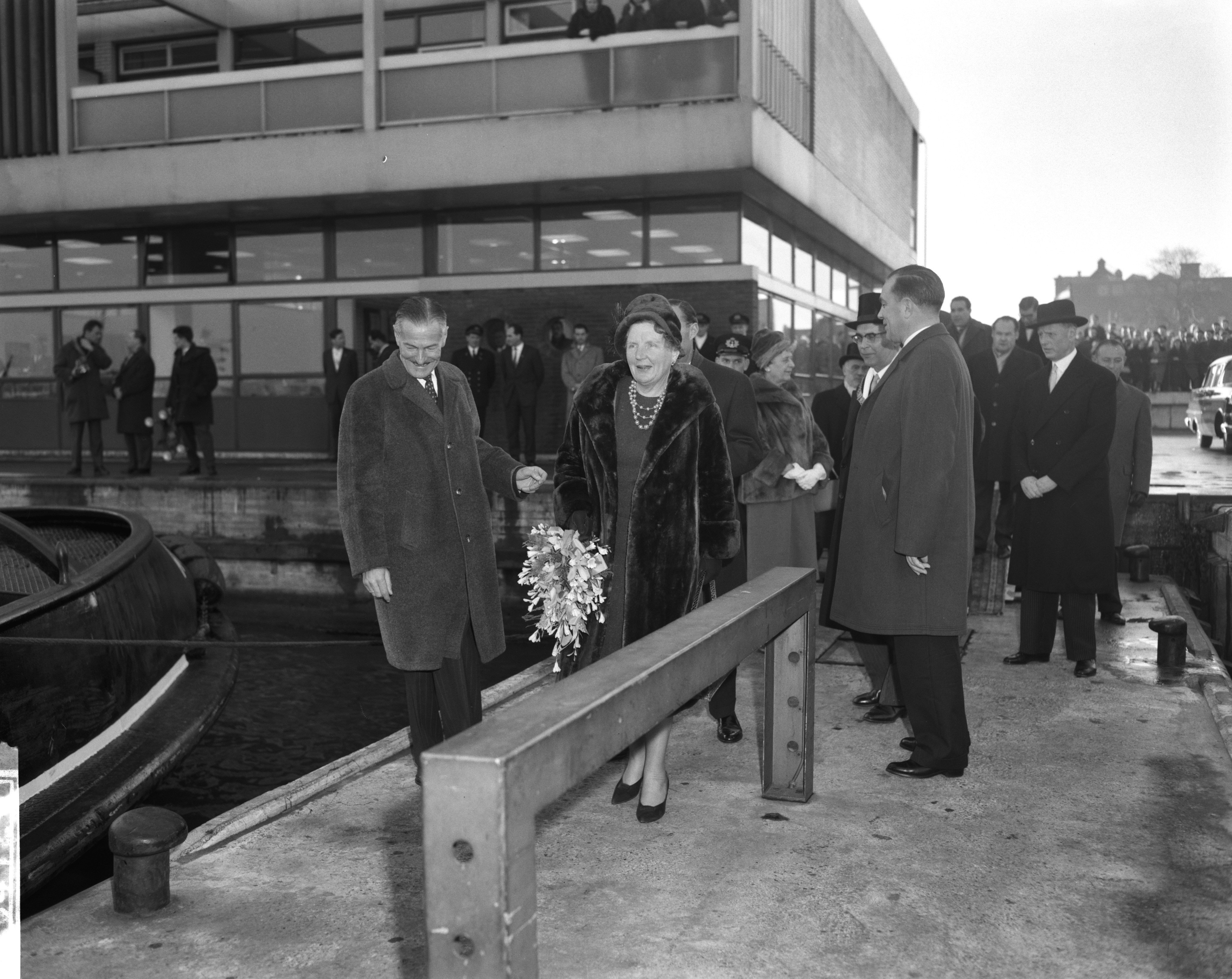 Collectie / Archief : Fotocollectie Anefo Reportage / Serie : [ onbekend ] Beschrijving : Koninklijk paar bezoekt rederij. Goedkoop sleepbootmodel. Koningin en prins bij sleepboot Datum : 1 februari 1962 Trefwoorden : REDERIJEN, koninginnen, modellen, prinsen, sleepboten Persoonsnaam : GOEDKOOP Fotograaf : Bilsen, Joop van / Anefo Auteursrechthebbende : Nationaal Archief Materiaalsoort : Negatief (zwart/wit) Nummer archiefinventaris : bekijk toegang 2.24.01.04 Bestanddeelnummer : 913-4723